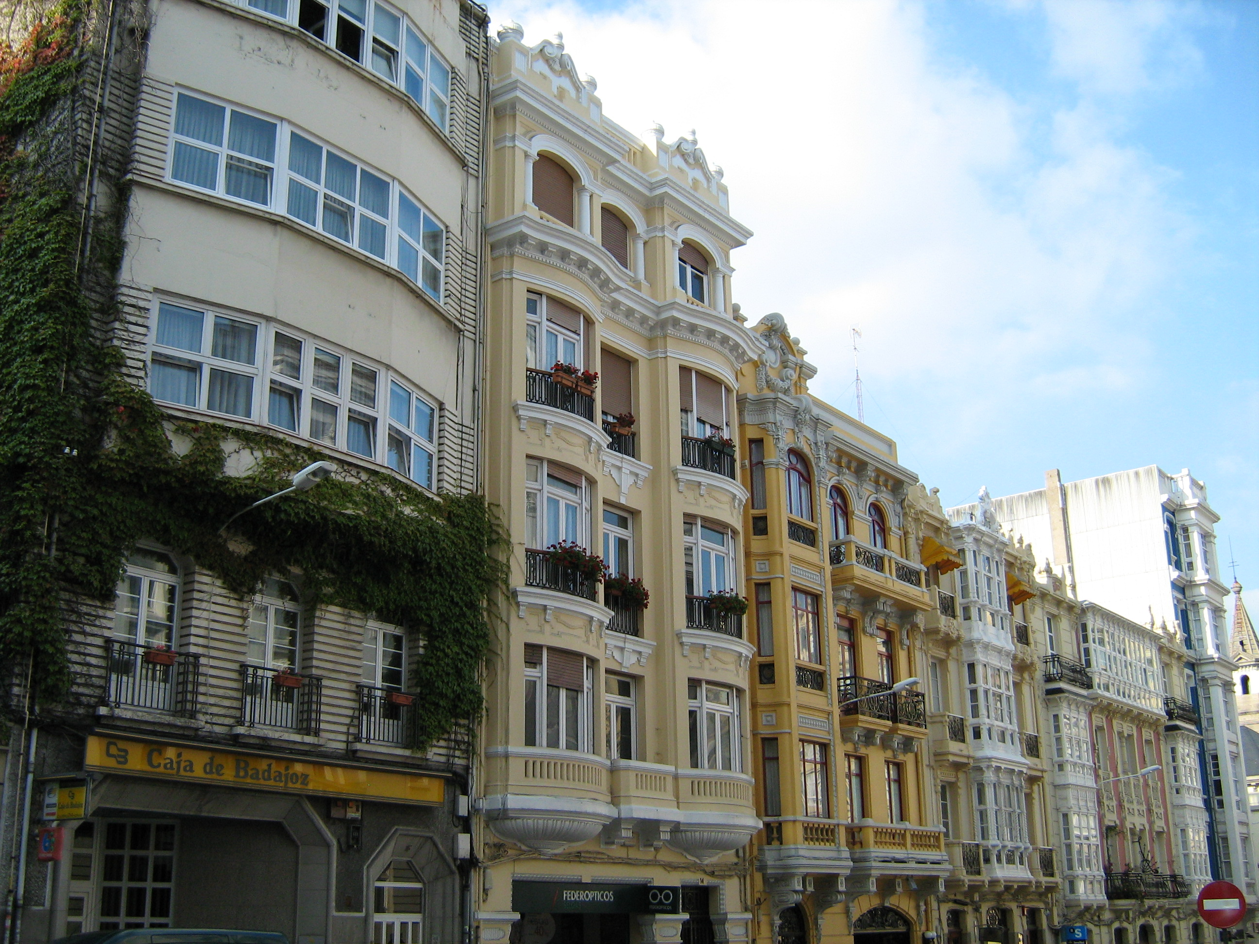 Rúa Ferrol, na Coruña